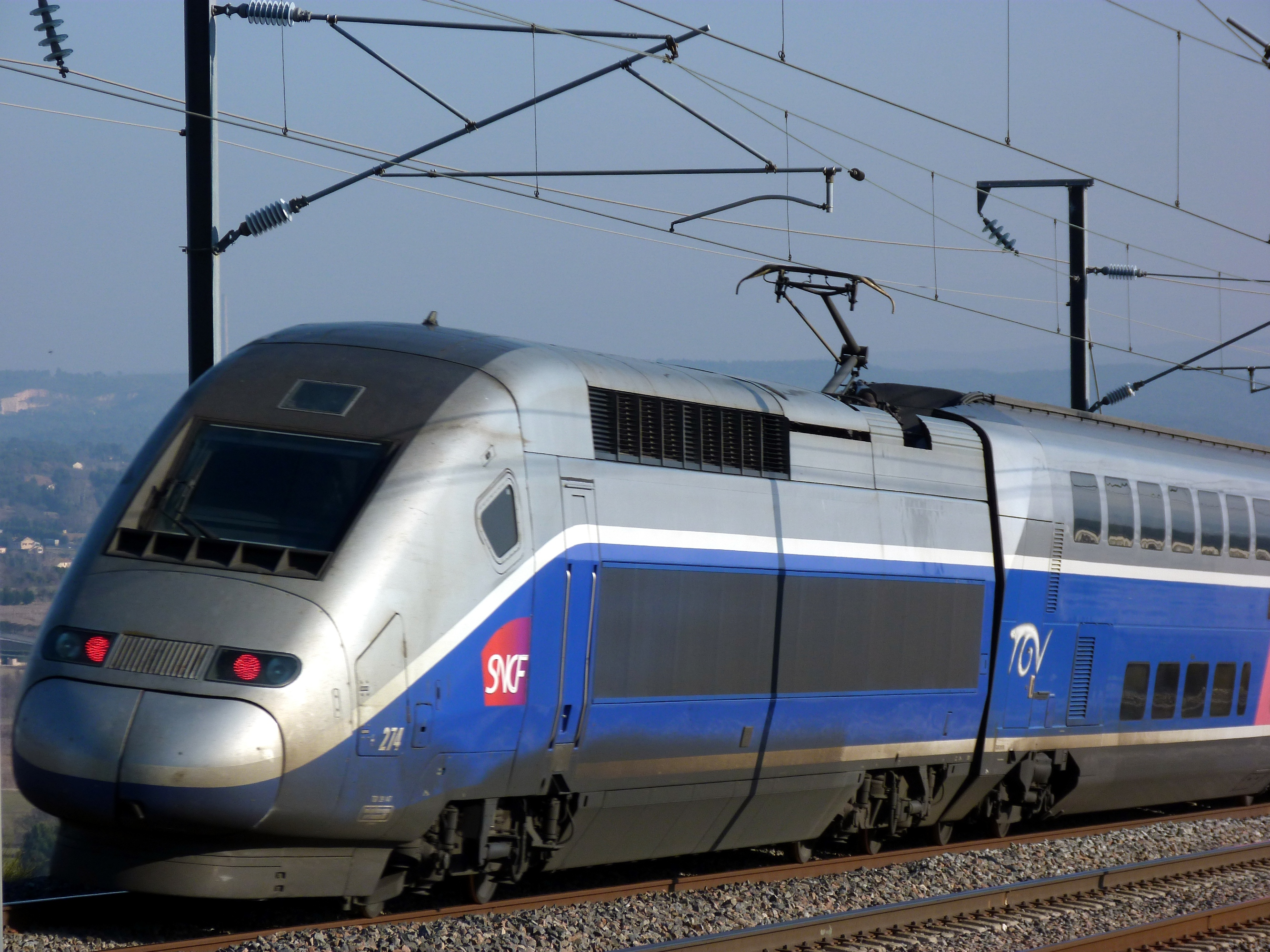 TGV Duplex n°274 circulant sur la LGV Méditerranée